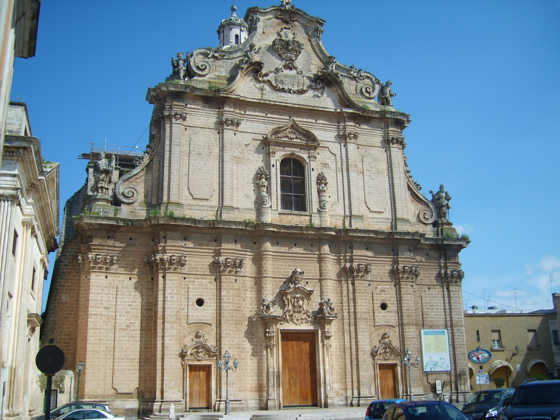 Facciata della Chiesa Madre